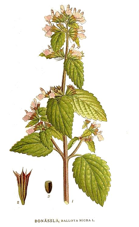 Original Description Bonässla, Ballota nigra L.